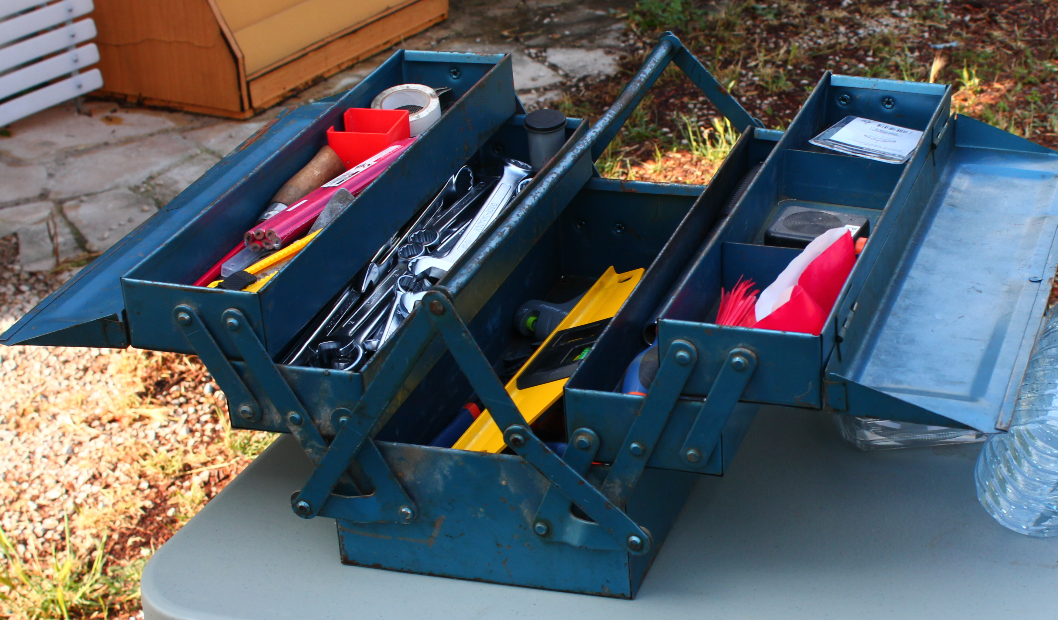 Caisse à outils avec petit outillage